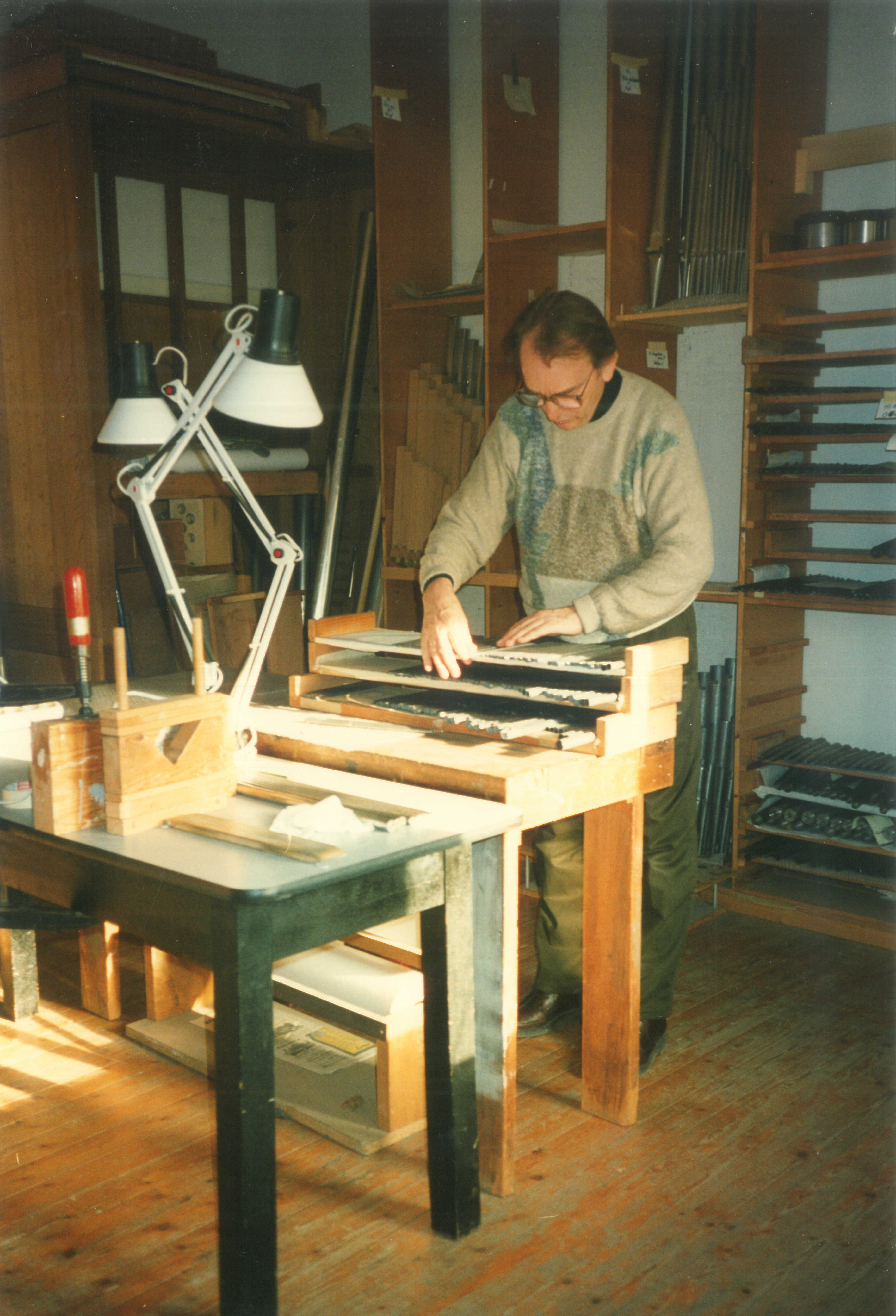 Rudolf Janke Orgelbauwerkstatt innen